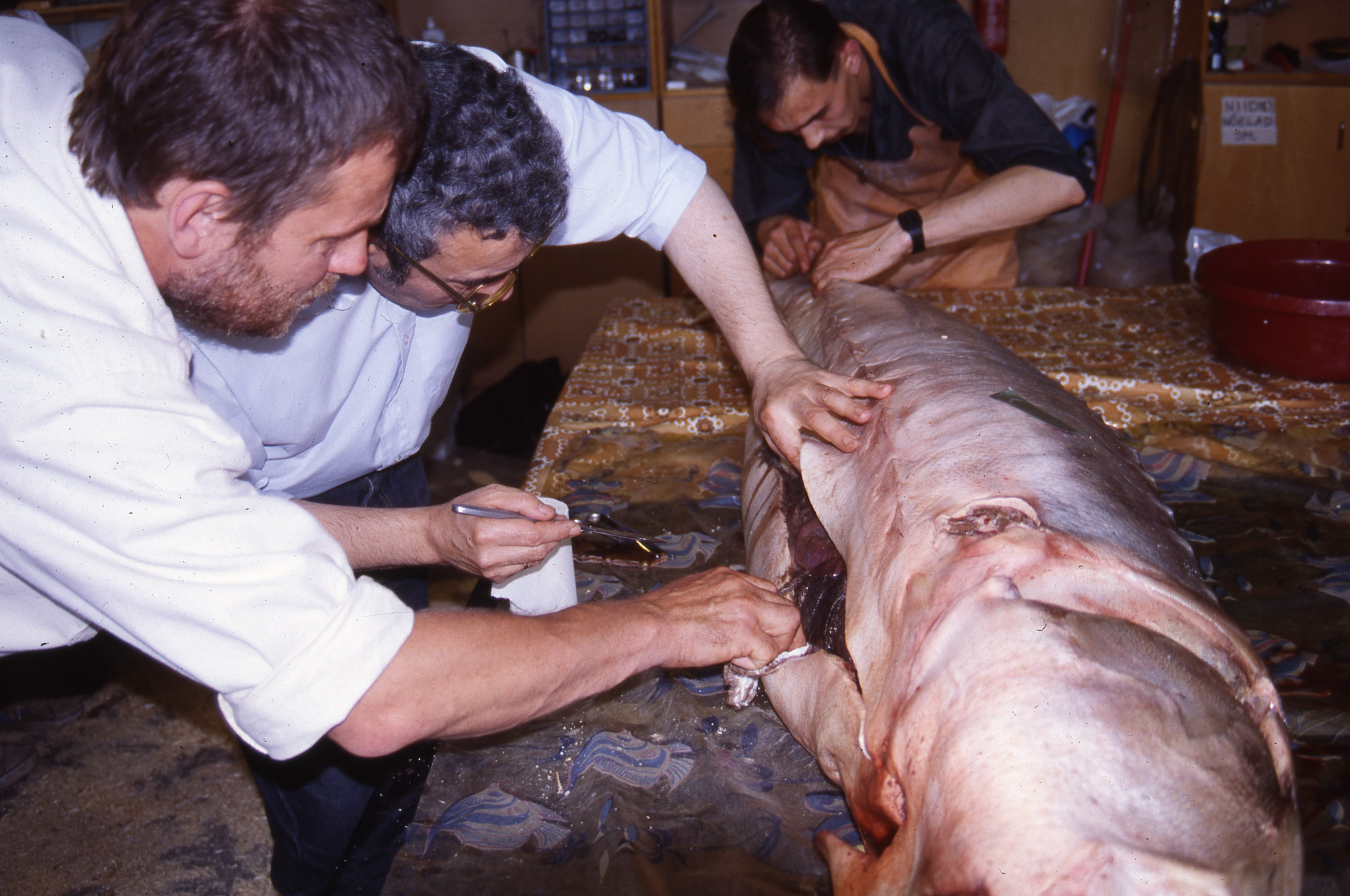 Atlandi tuura „Maria“ konserveerimine (1996), Eesti Loodusmuuseumi fotokogu TAMF0007814